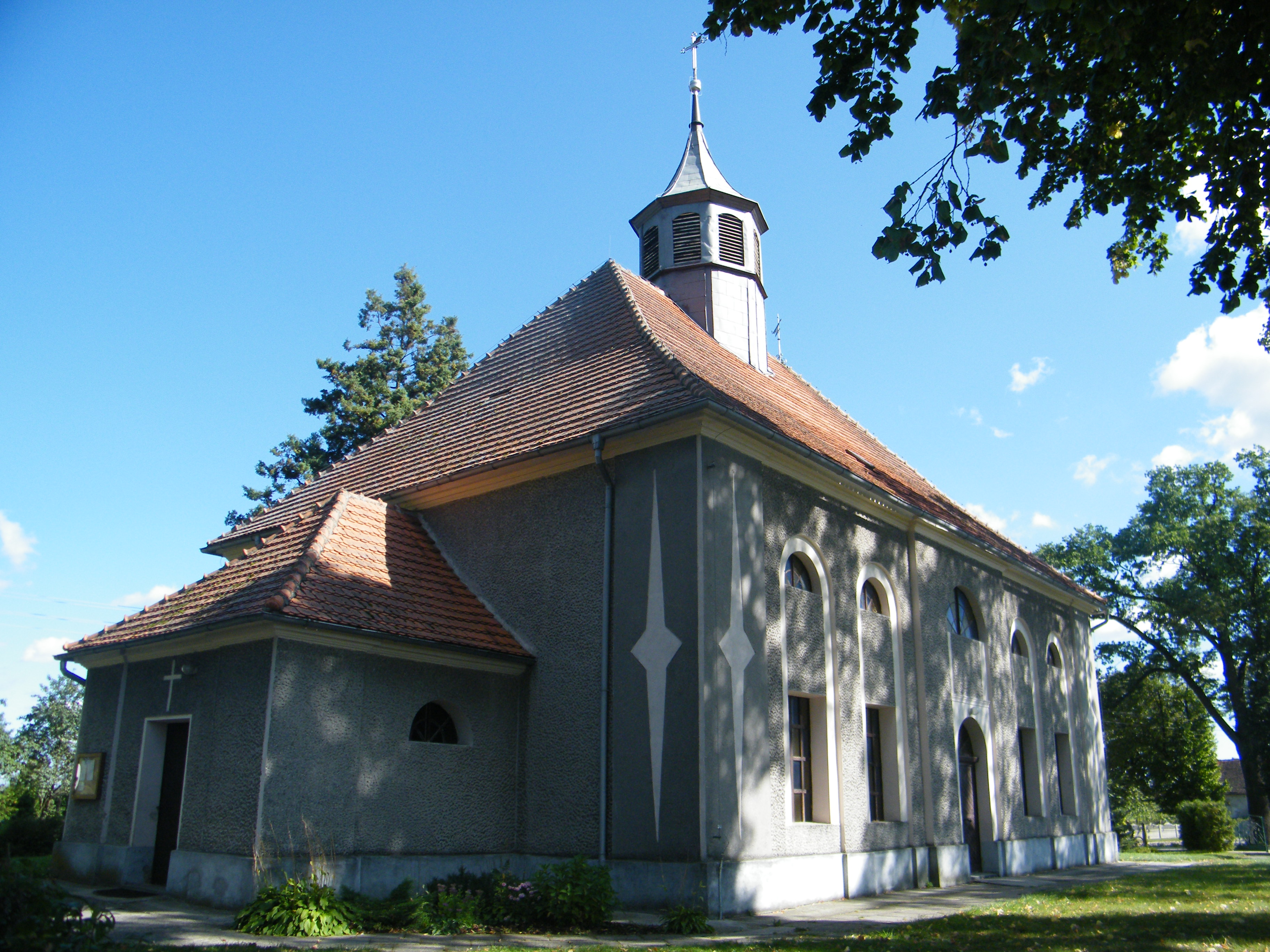 kościół ewangelicki, ob. rzym.-kat fil. p.w. św. Judy Tadeusza Kurznie, Popielów 01.1966.